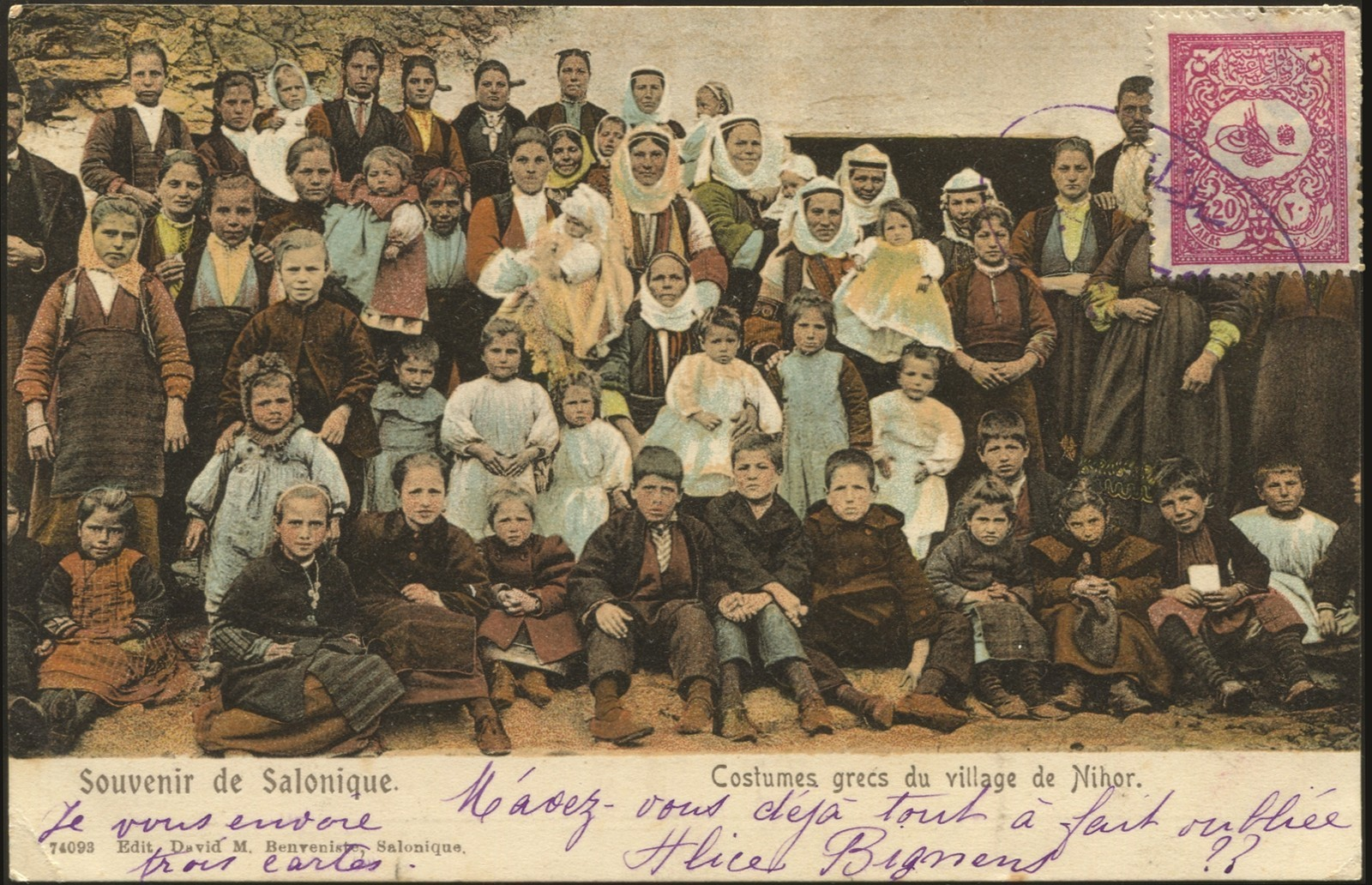 Селяни в Неохори, Берско